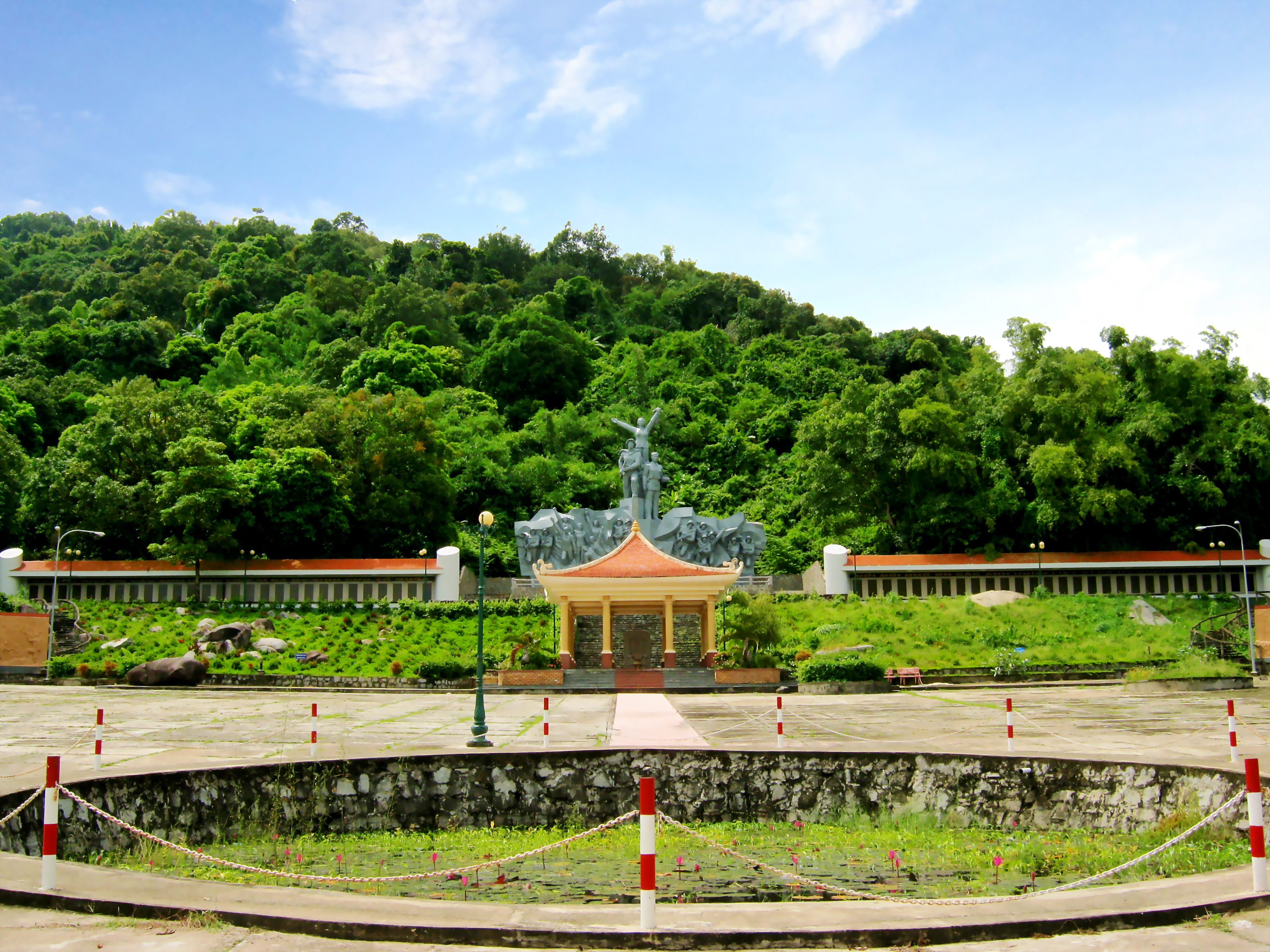 Khu mộ Chị Sứ dưới chân Hòn Đất, thuộc xã Thổ Sơn, huyện Hòn Đất, tỉnh Kiên Giang, Việt Nam.